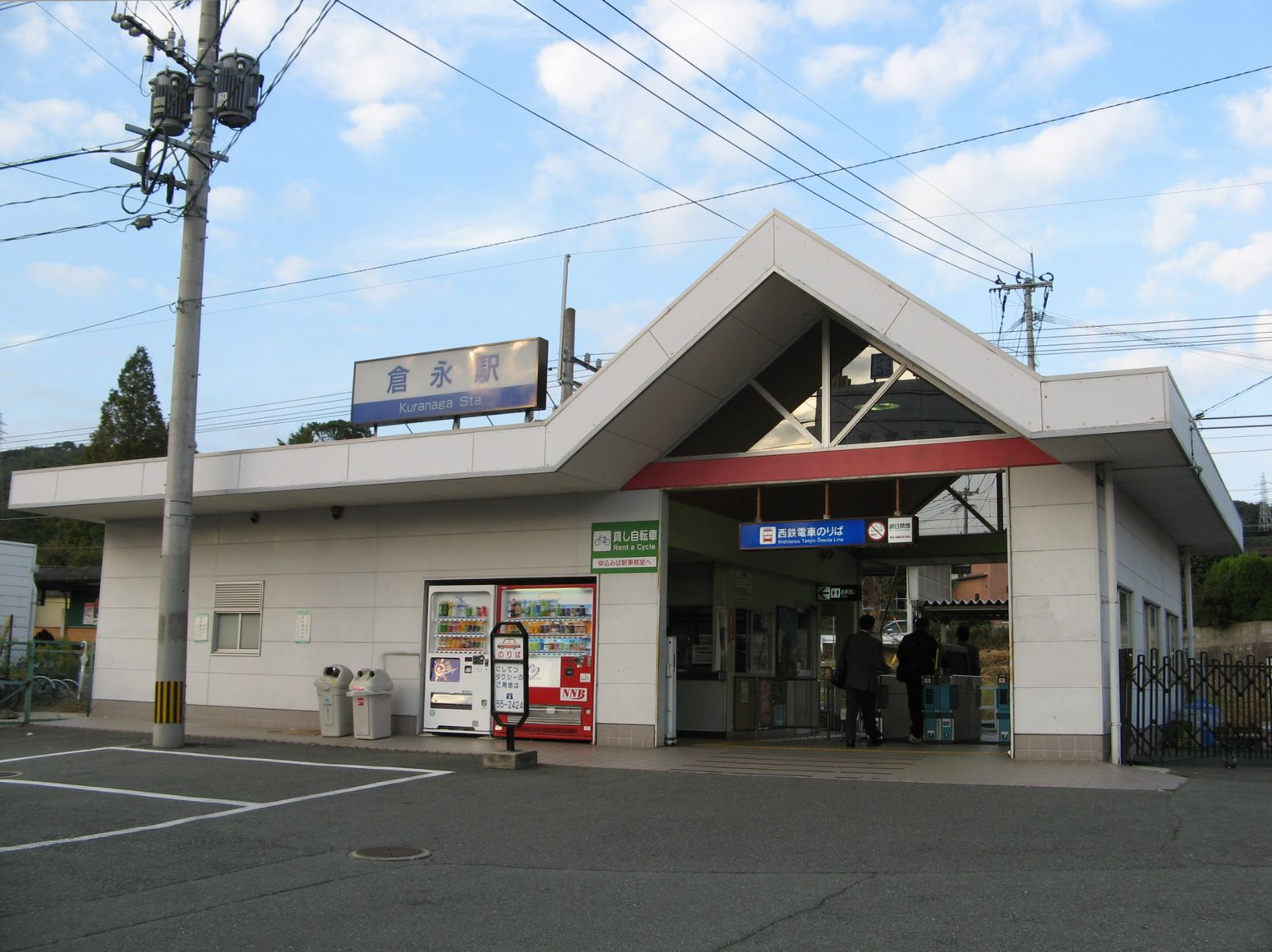 倉永駅 駅舎 福岡県大牟田市 2007年11月2日 Bakkai撮影